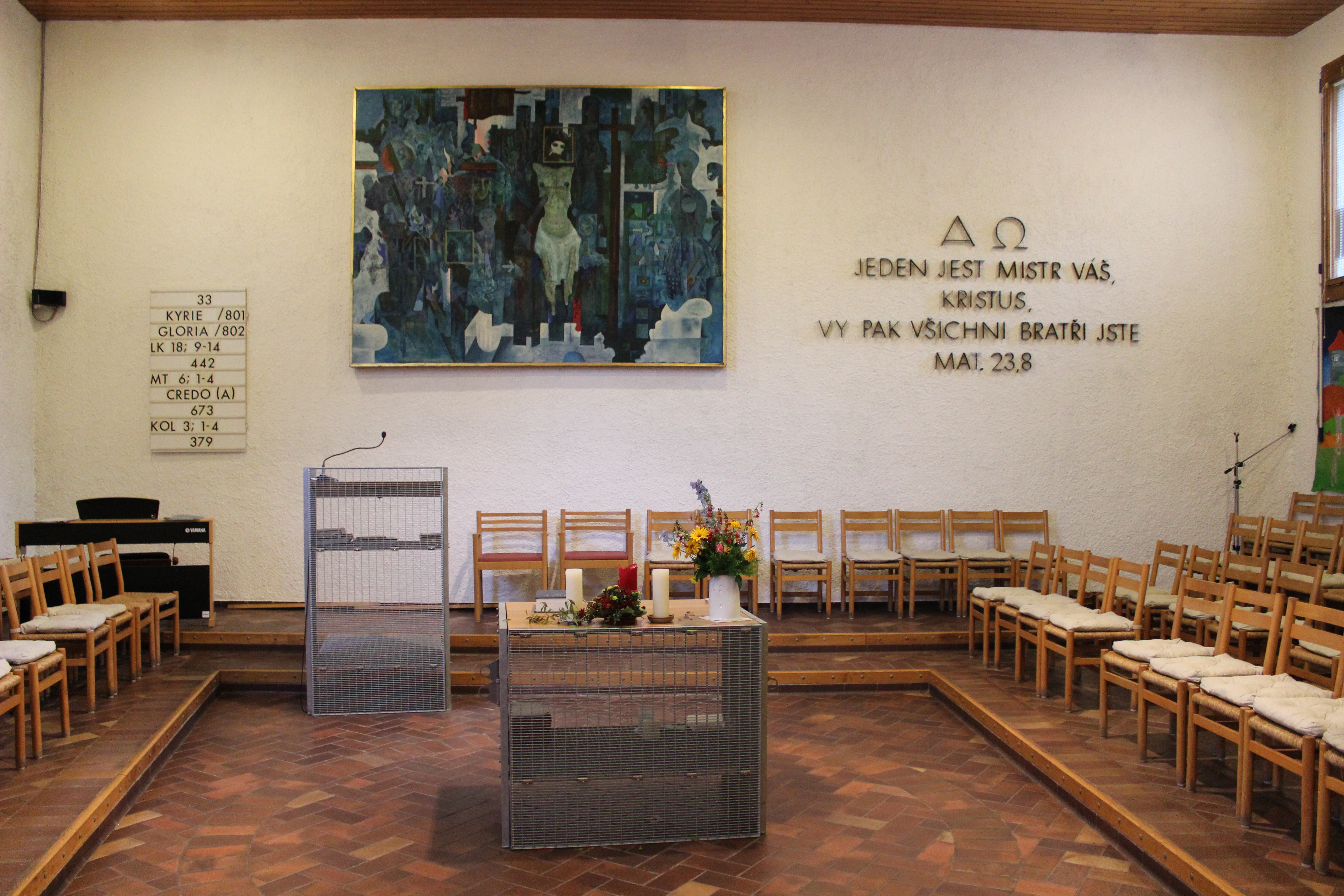 Čelní stěna v bohoslužebném sále kostela U Jákobova žebříku.